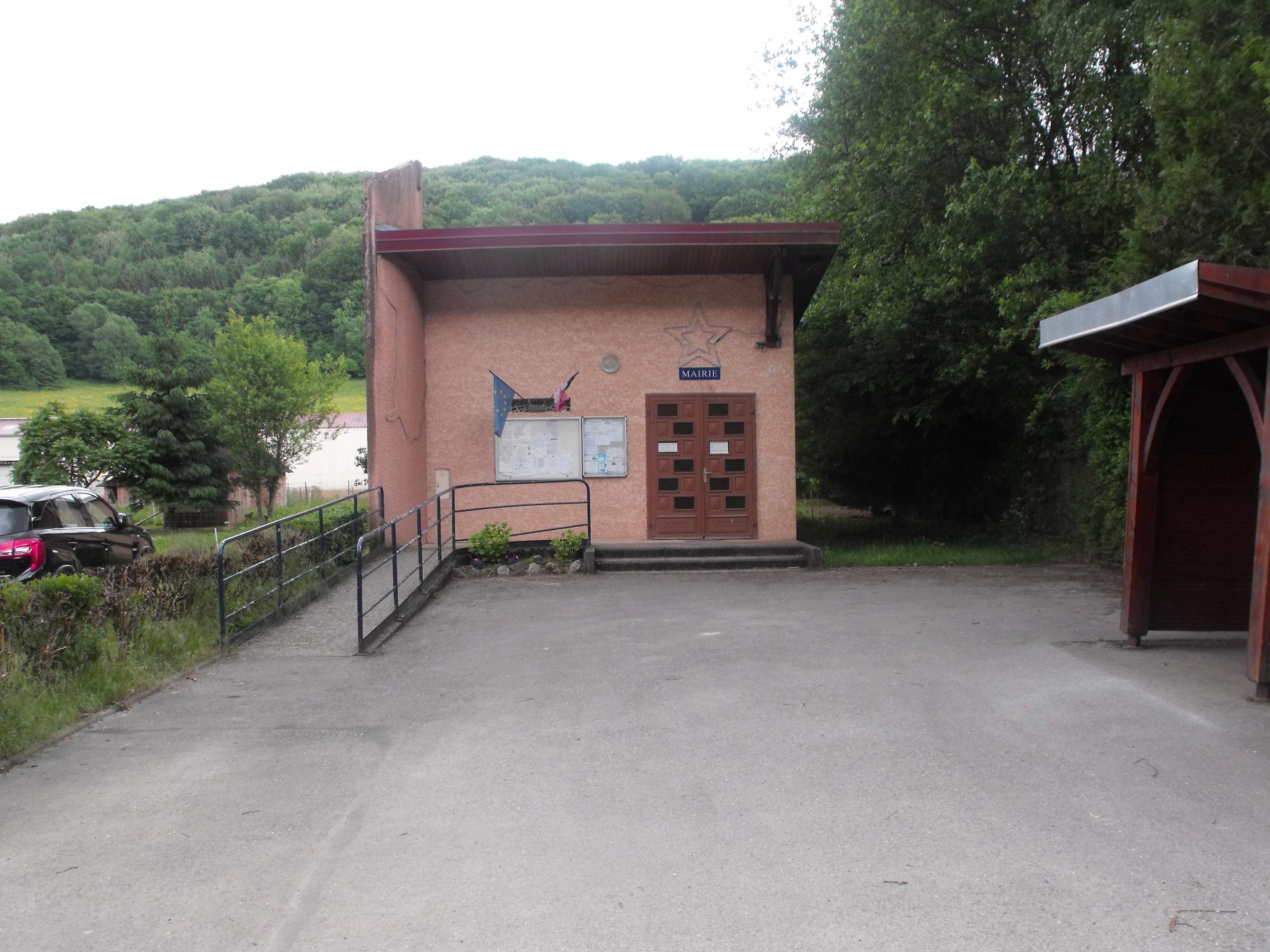 Mairie de Sourans, Doubs ,France